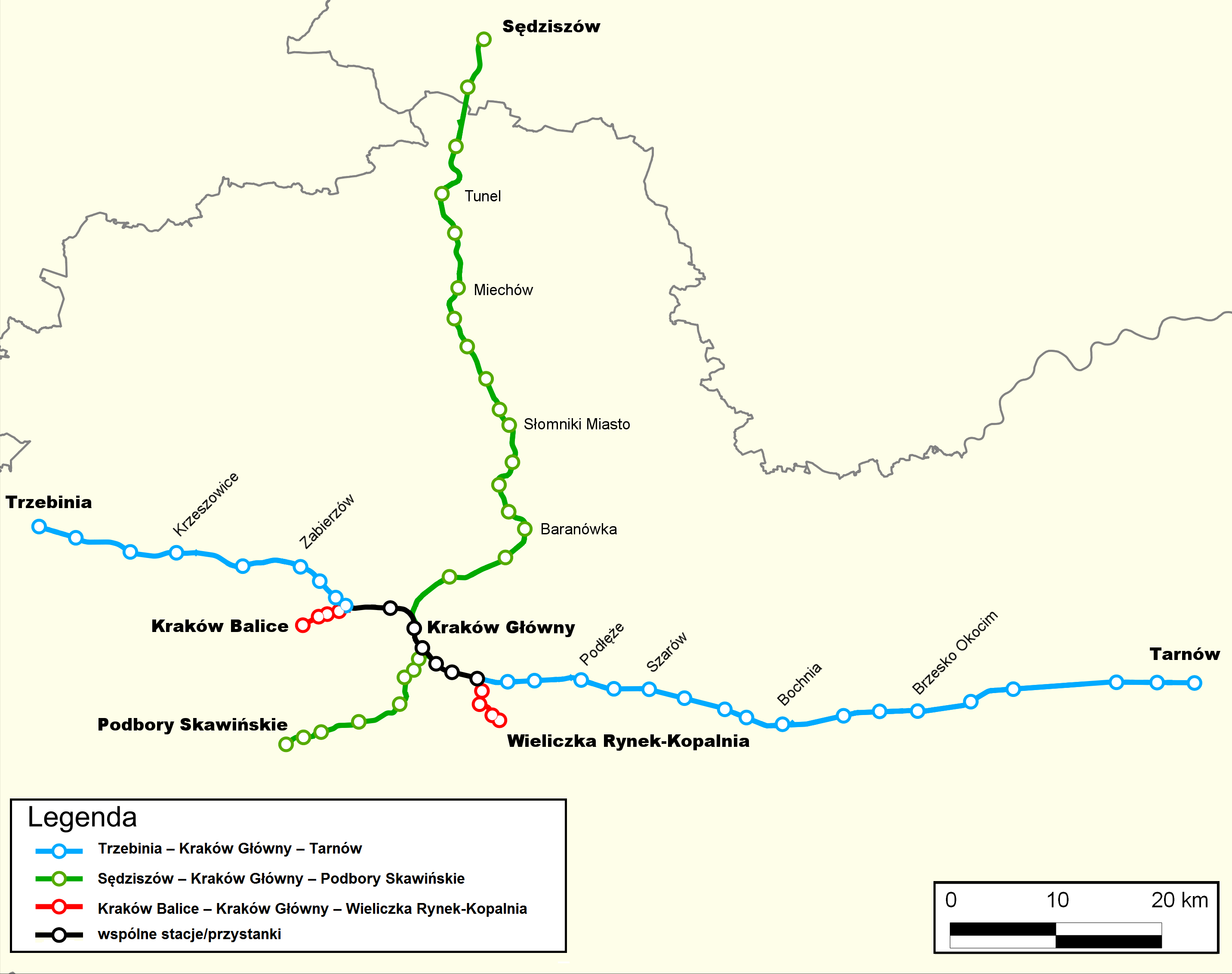 Mapa Szybkiej Kolei Aglomeracyjnej w Aglomeracji Krakowskiej w docelowym przebiegu This graphic was created with QGIS